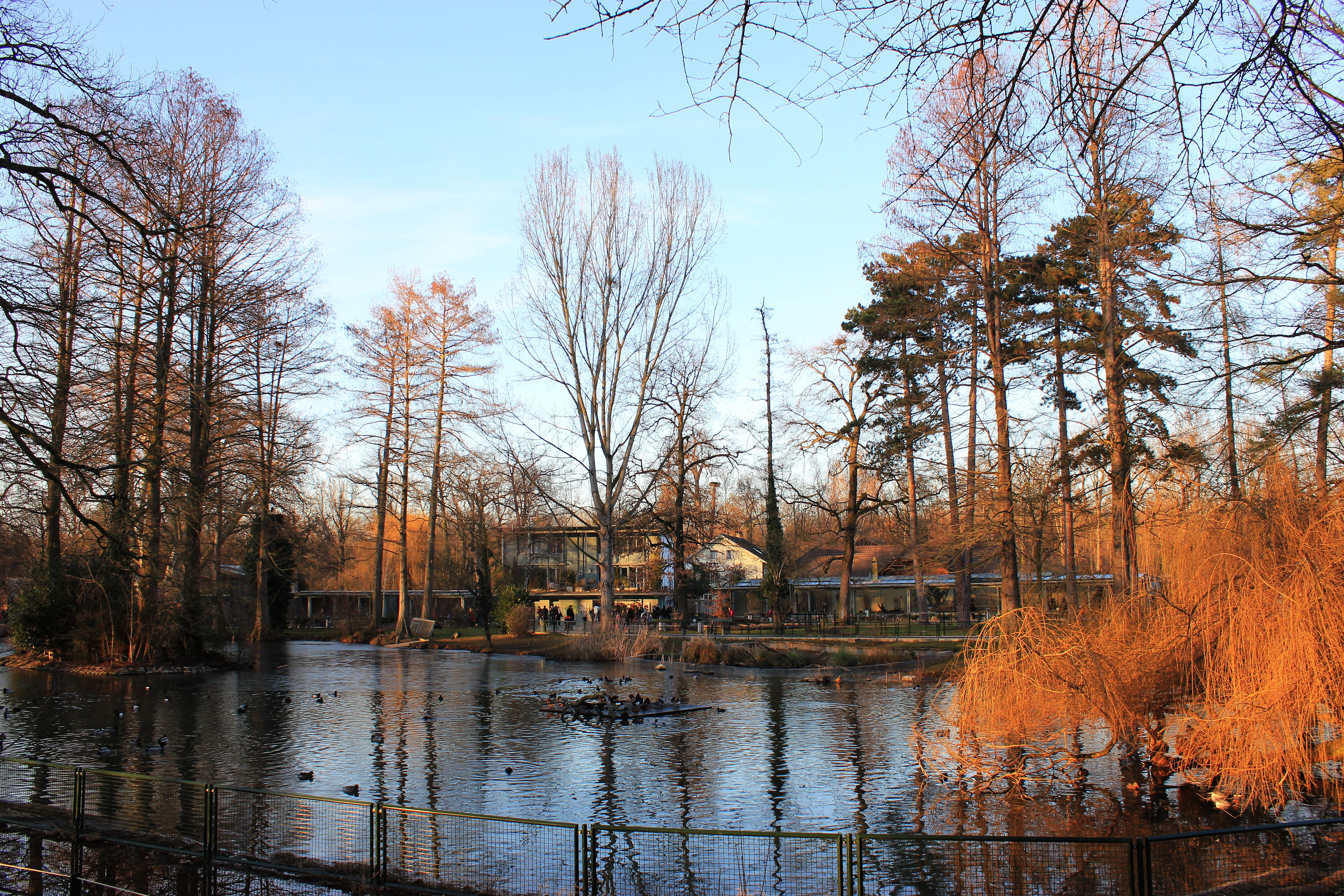 Basel - Tierpark Lange Erlen - Ententeich (Oberer Weiher).